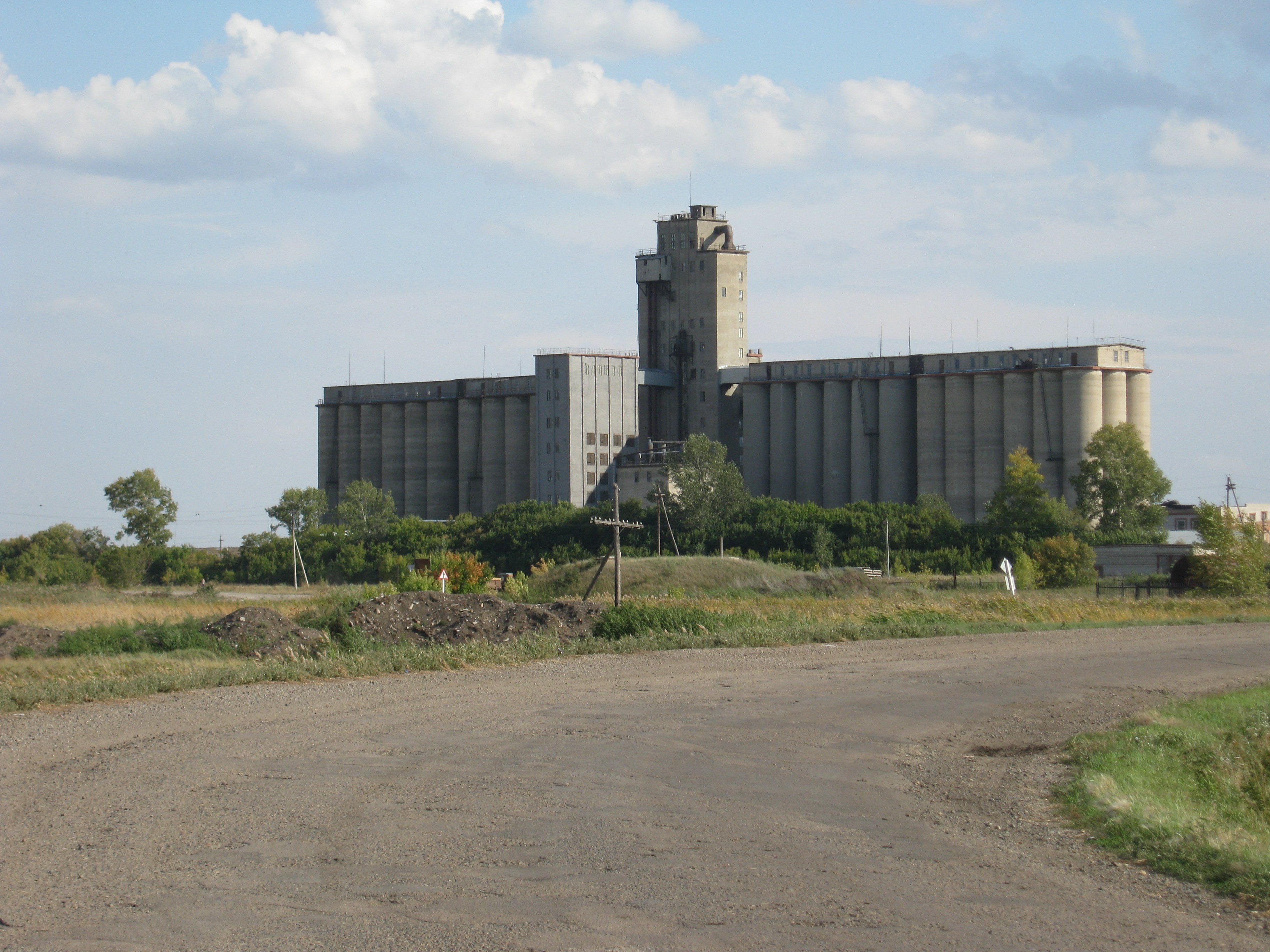 п.Комсомольский, Мамонтовский район, Алтайский край. Корчинский элеватор.